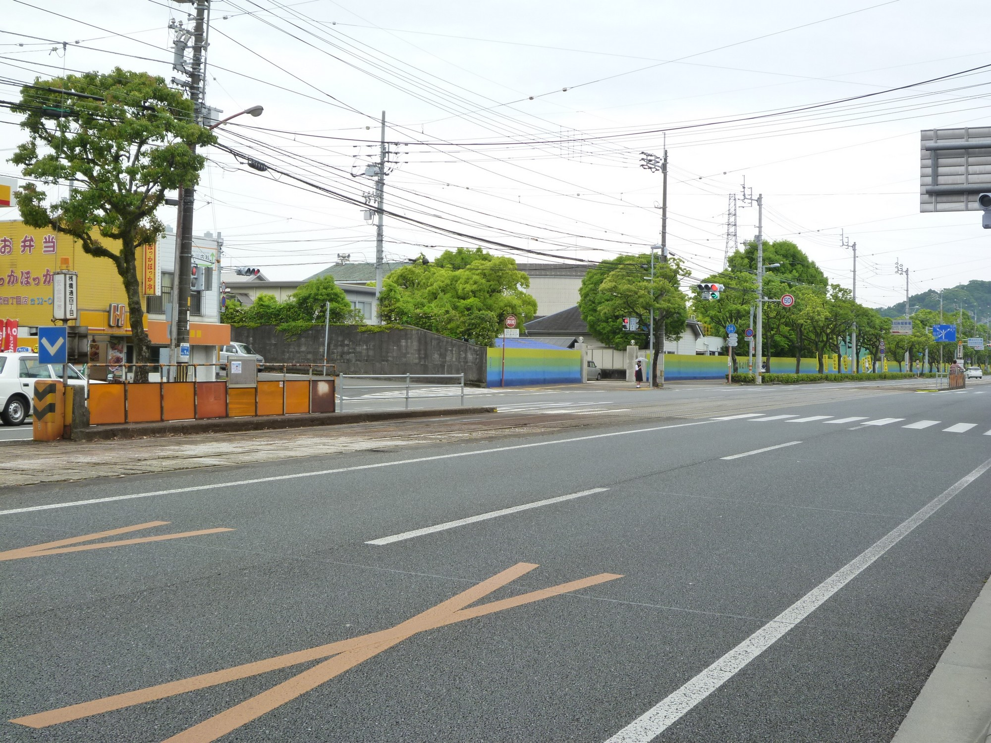 2015年5月9日撮影。